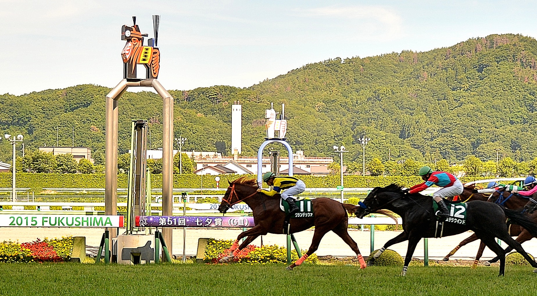 2015年7月12日に福島競馬場の第11競走で行われた「第51回七夕賞(GIII)」で、ゴールする瞬間を観客席から撮影したもの。先頭の11番の馬はグランデッツァと川田将雅騎手。